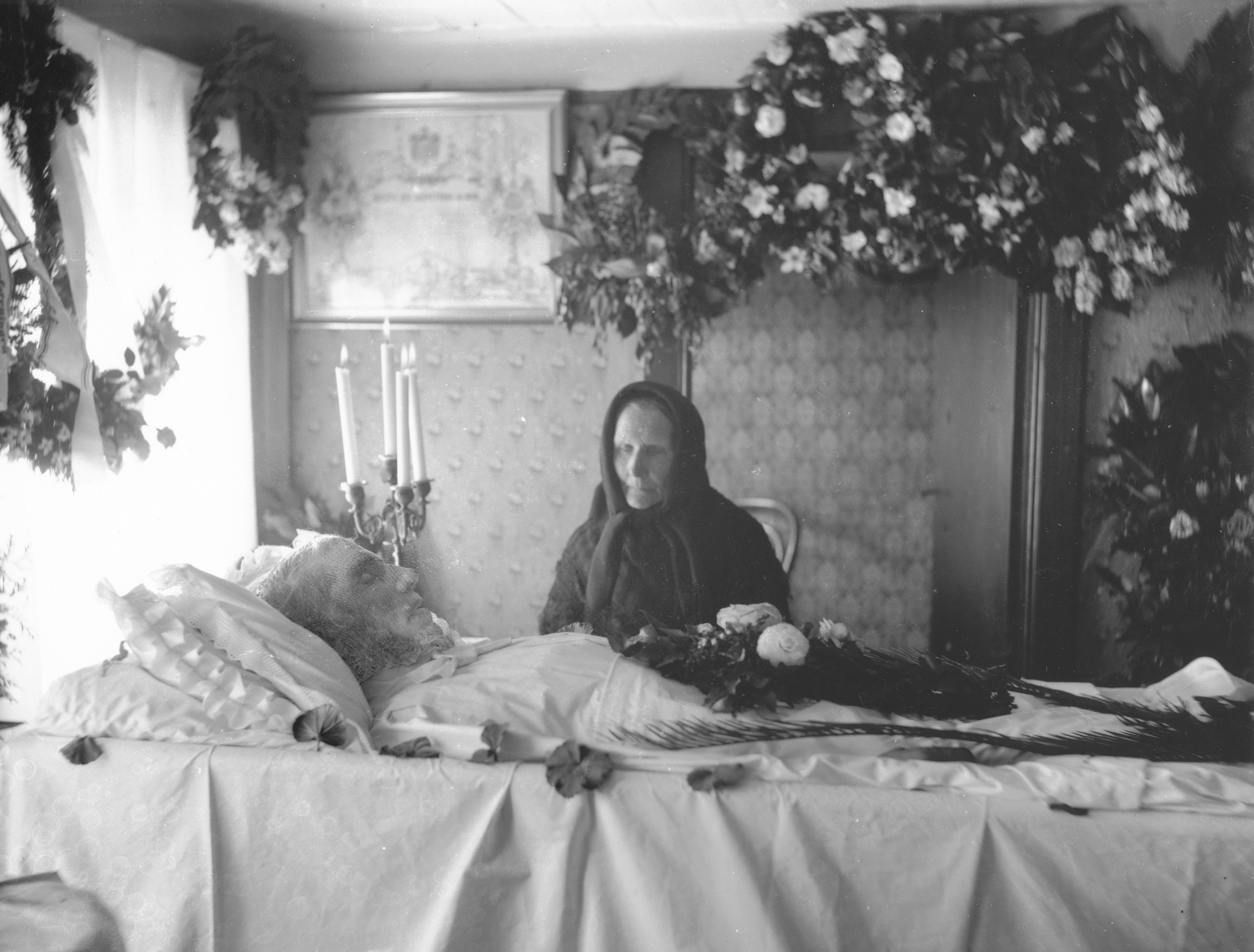 Redningsformand Lars Kruse, Skagen. Lit de parade